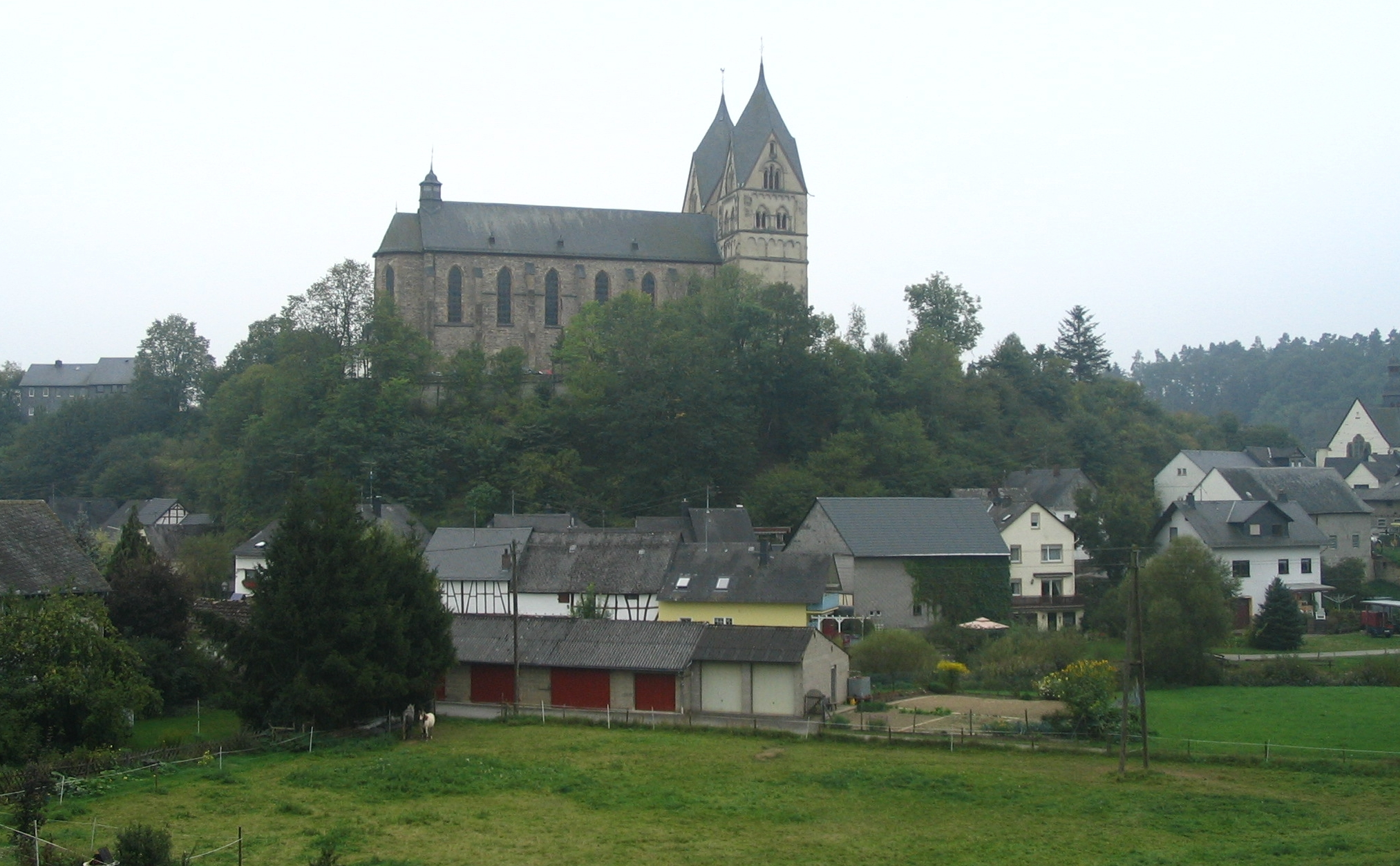 Hunsrückdom Ravengiergsburg